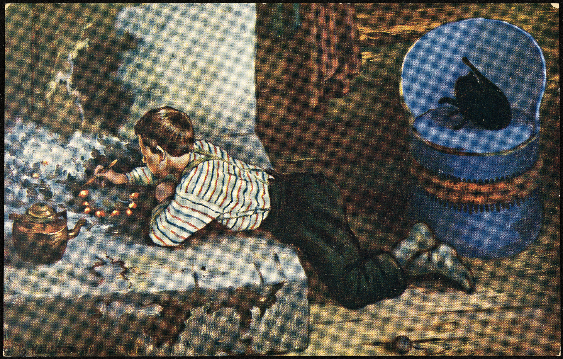 Tittel / Title: Th. Kittelsen: Askeladdens eventyr (Soria Moria) Motiv / Motif: Postkort. Askeladden i grua. "Han ville aldrig gjøre noget, bare ligge og grave i Asken". Originalmaleriet eies av Nasjonalmuseet. Serien Soria Moria ble malt på Lauvlia i Sigdal i 1900 og består av 12 malerier. Dato / Date: malt 1900 / painted 1900 Kunstner / Artist: Theodor Kittelsen (1857-1914) Utgiver / Publisher: Mittet & Co. (nr. 206) Eier / Owner Institution: Nasjonalbiblioteket / National Library of Norway Lenke / Link: Bildesignatur / Image Number: blds_04837